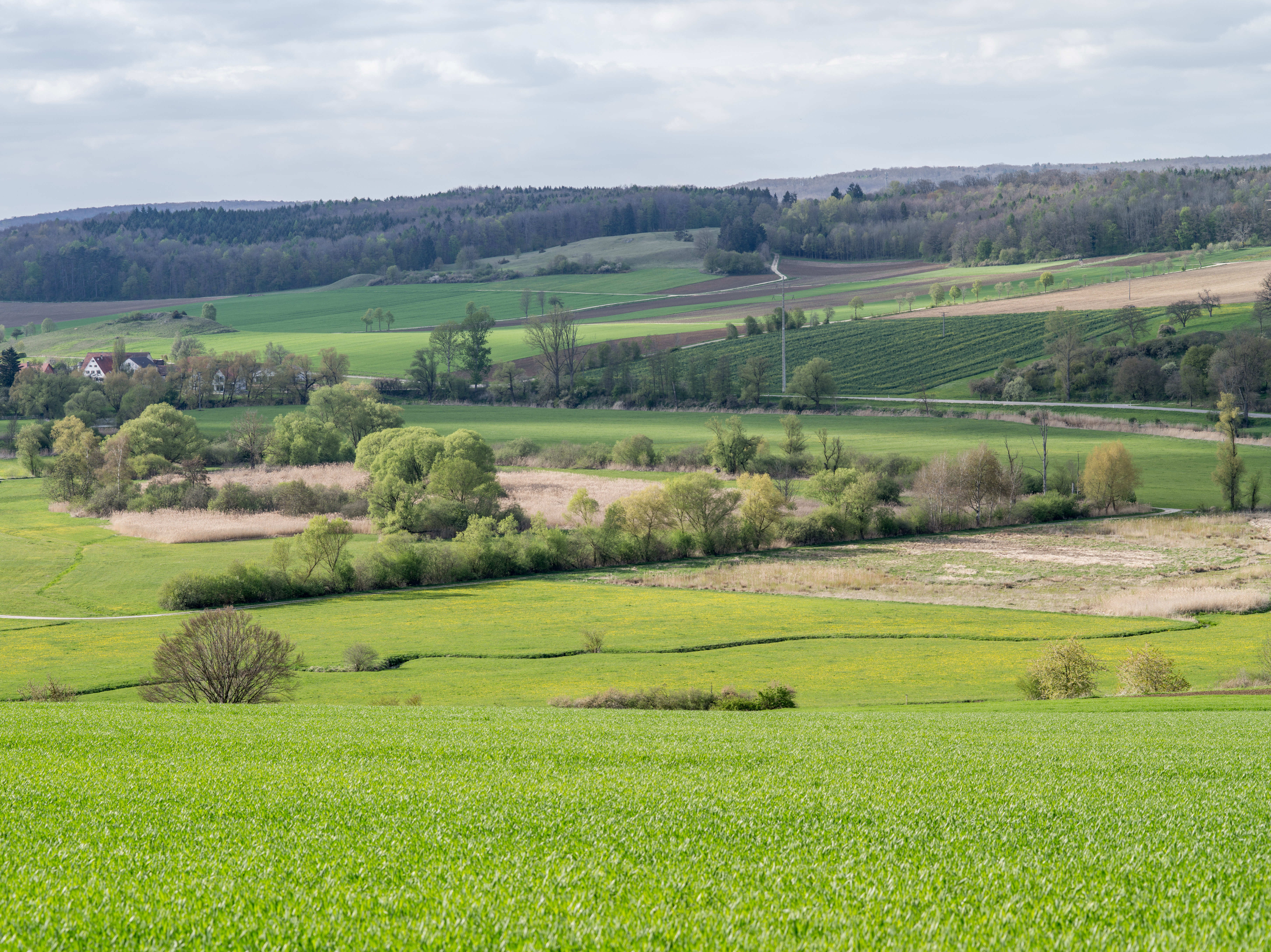 Übersicht des Naturschutzgebietes Priel von einer benachbarten Anhöhe hinunter ins Wörnitztal; Häuser im Hintergrund zugehörig zum Harburger Ortsteil Brünsee